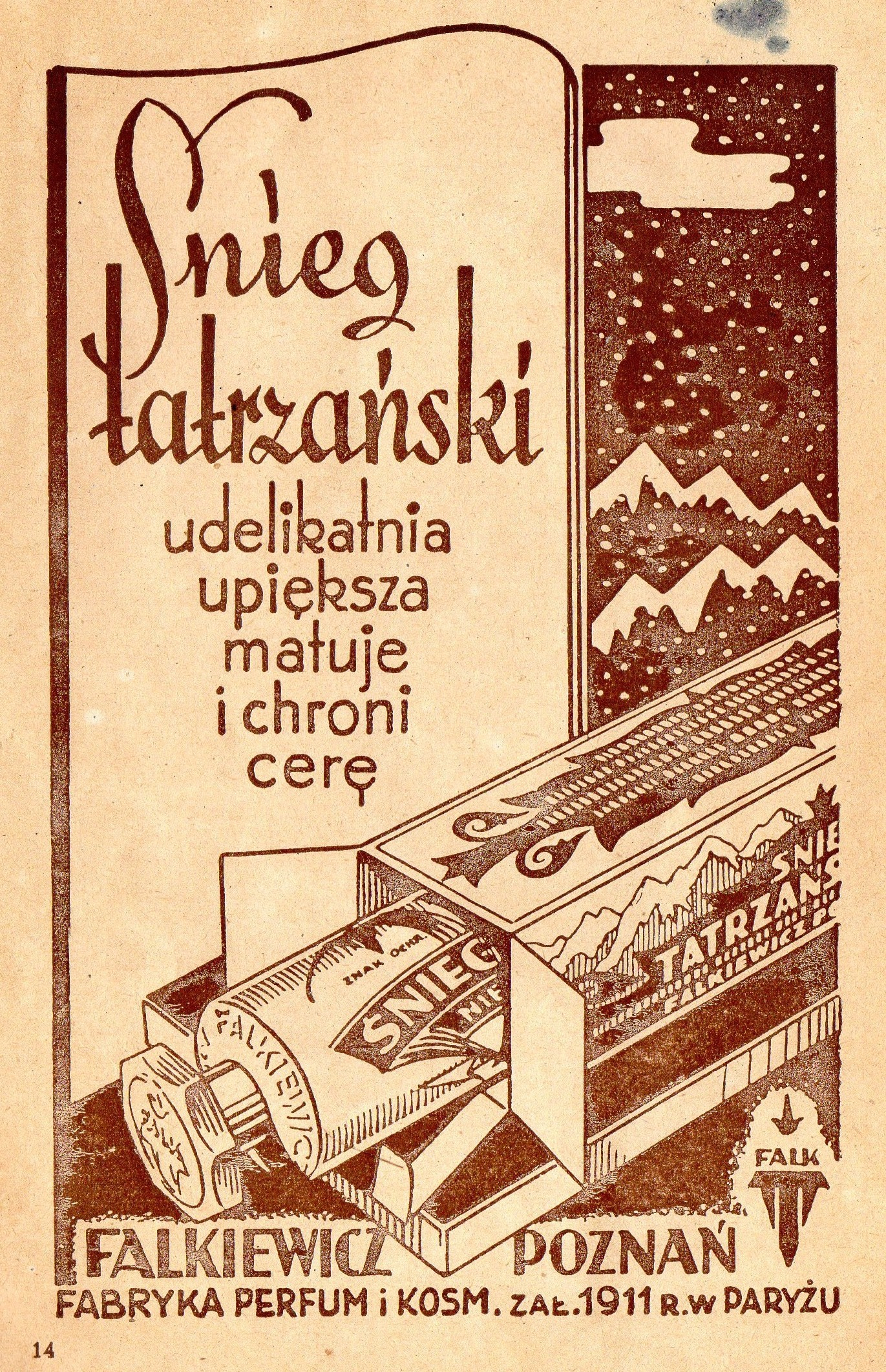 Reklama Śniegu Tatrzańskiego z 1947r.